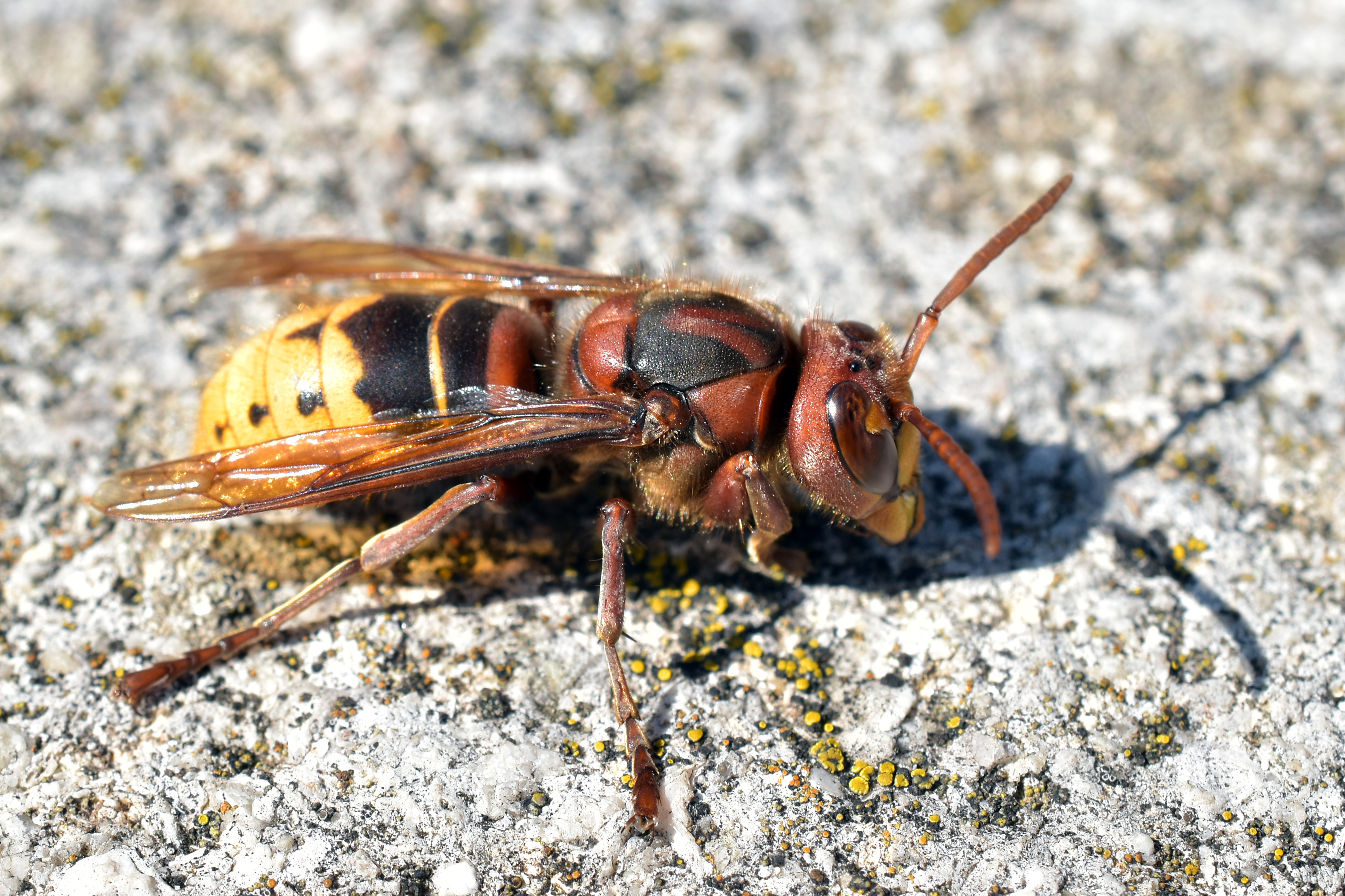 Hornisse